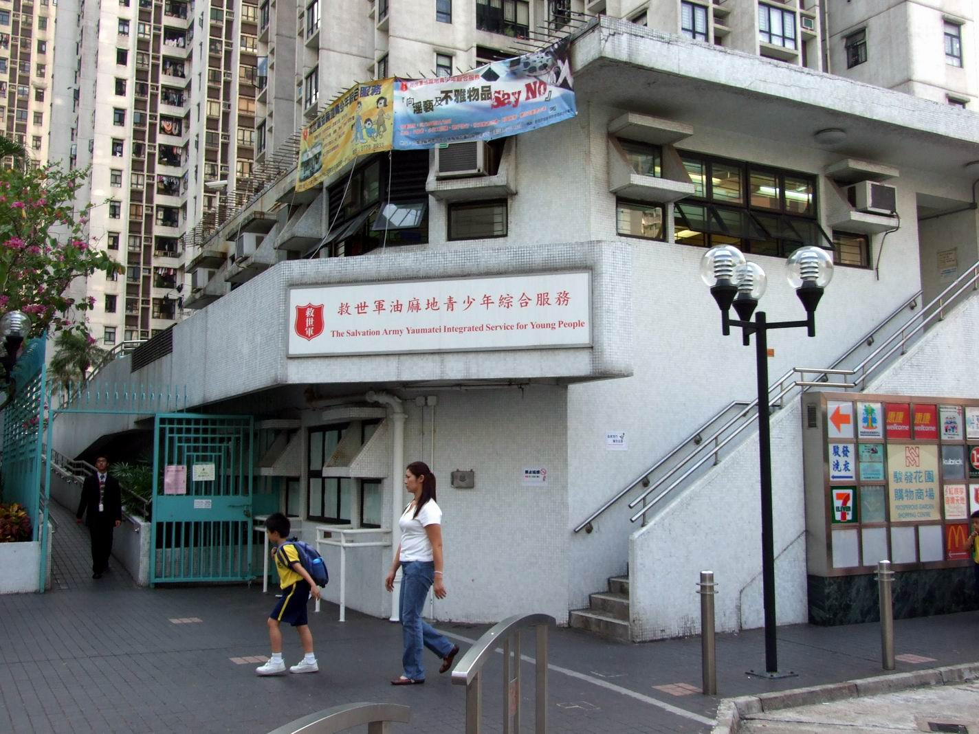 中文（香港）: 香港救世軍油麻地青少年綜合服務